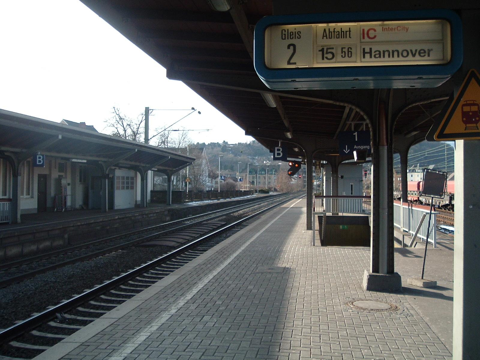 Gleis 2 - Bahnhof Andernach